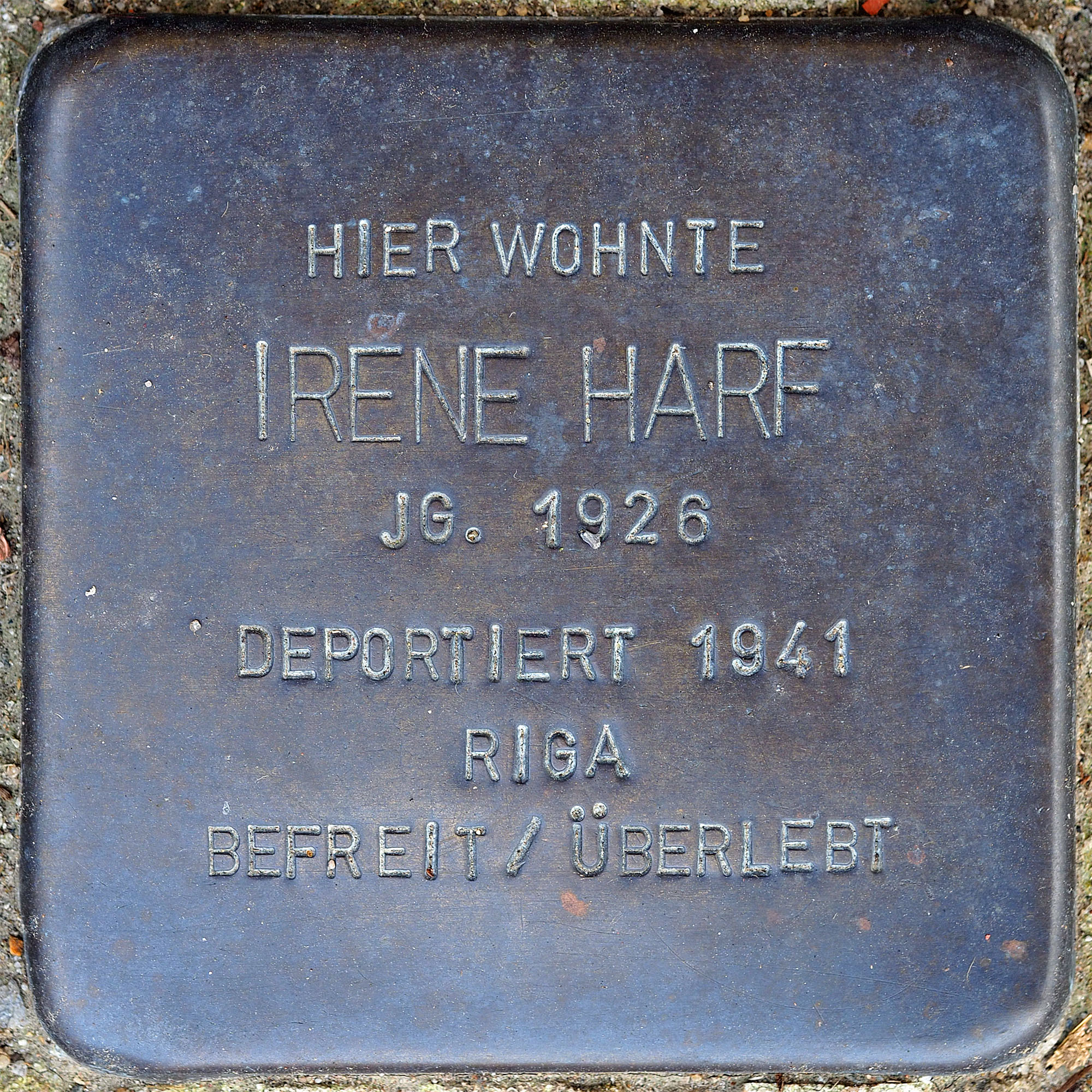 Stolpersteine MG: Harf, Irene